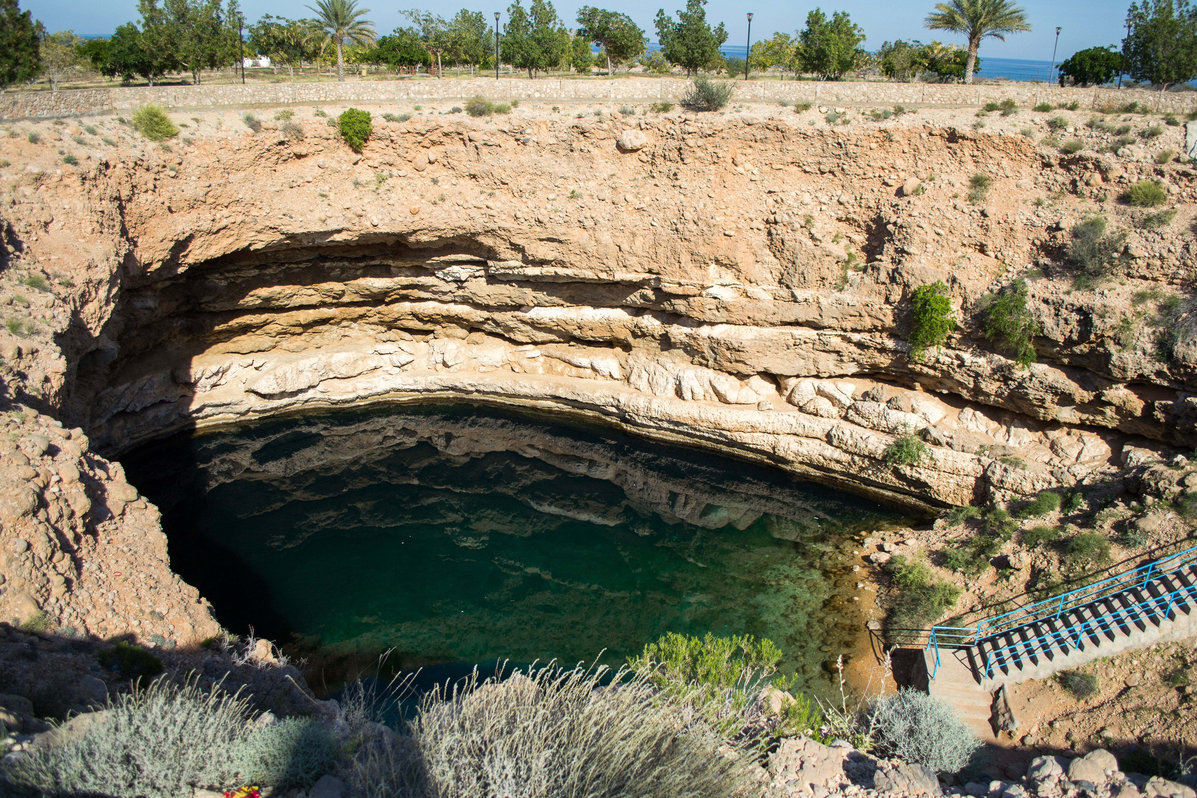 Oman2-056